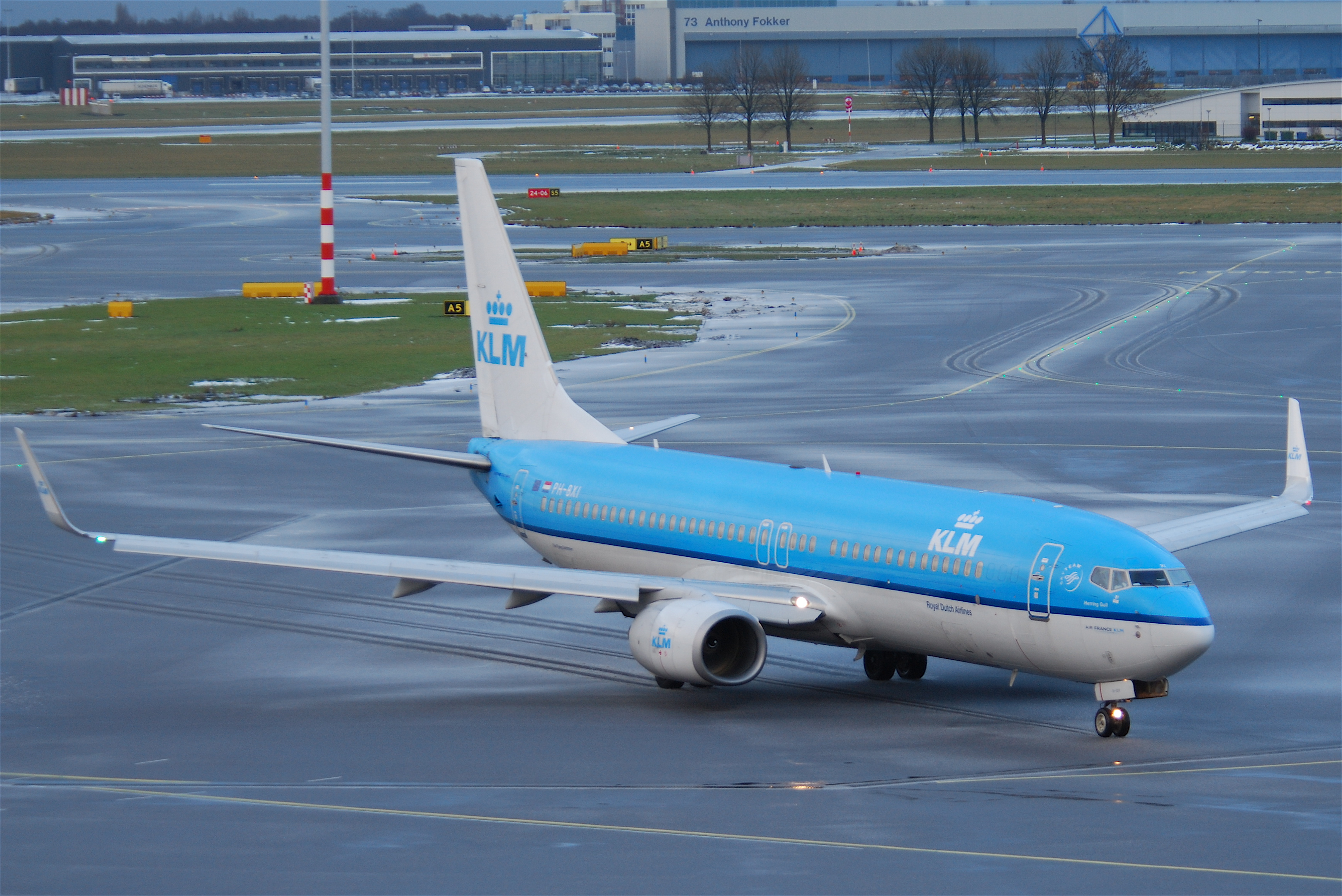 KLM Boeing 737-8K2; PH-BXI@AMS;09.12.2010/590aw